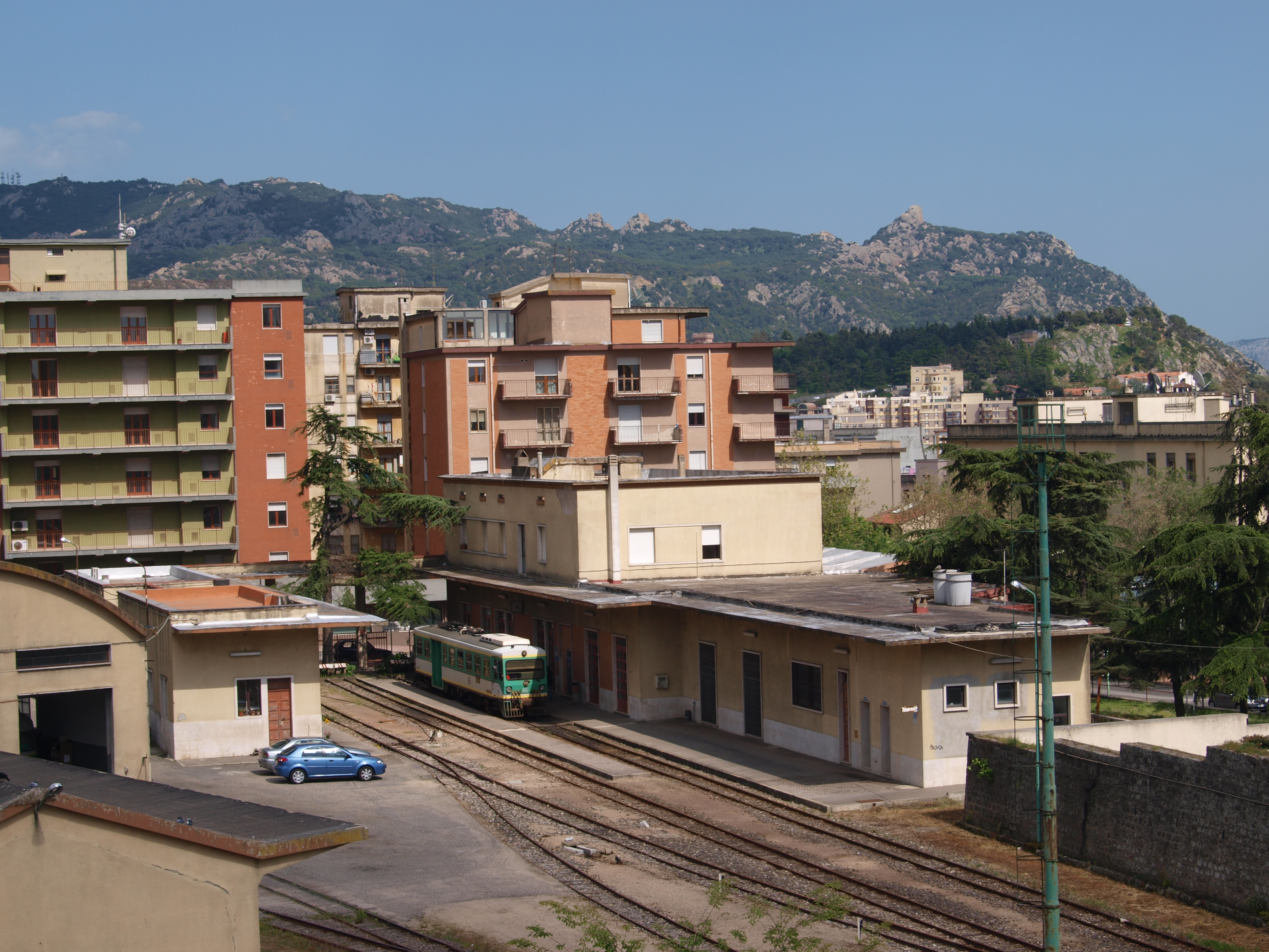 Bahnhof Nuoro